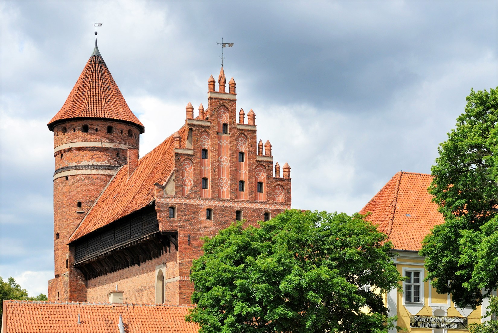 Olsztyn, ul. Zamkowa 2 - zamek z podzamczem, XIV-XVII, XIX